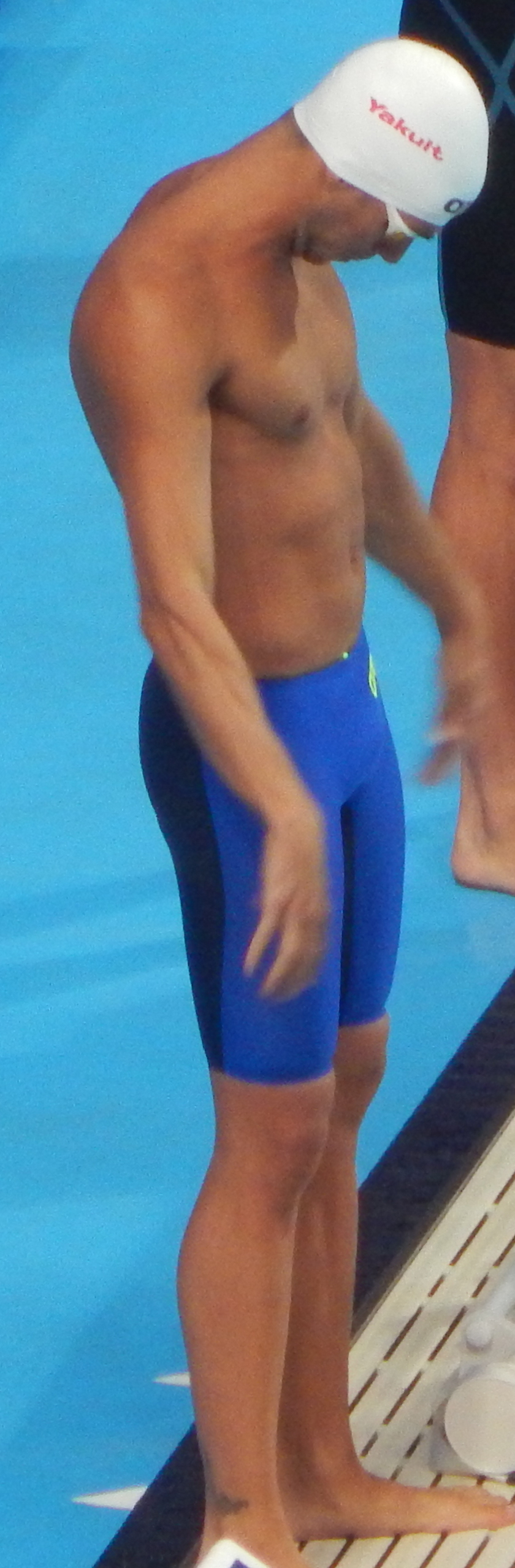 Федерико Грабич перед стартом финала 100 метров в/с в Казани